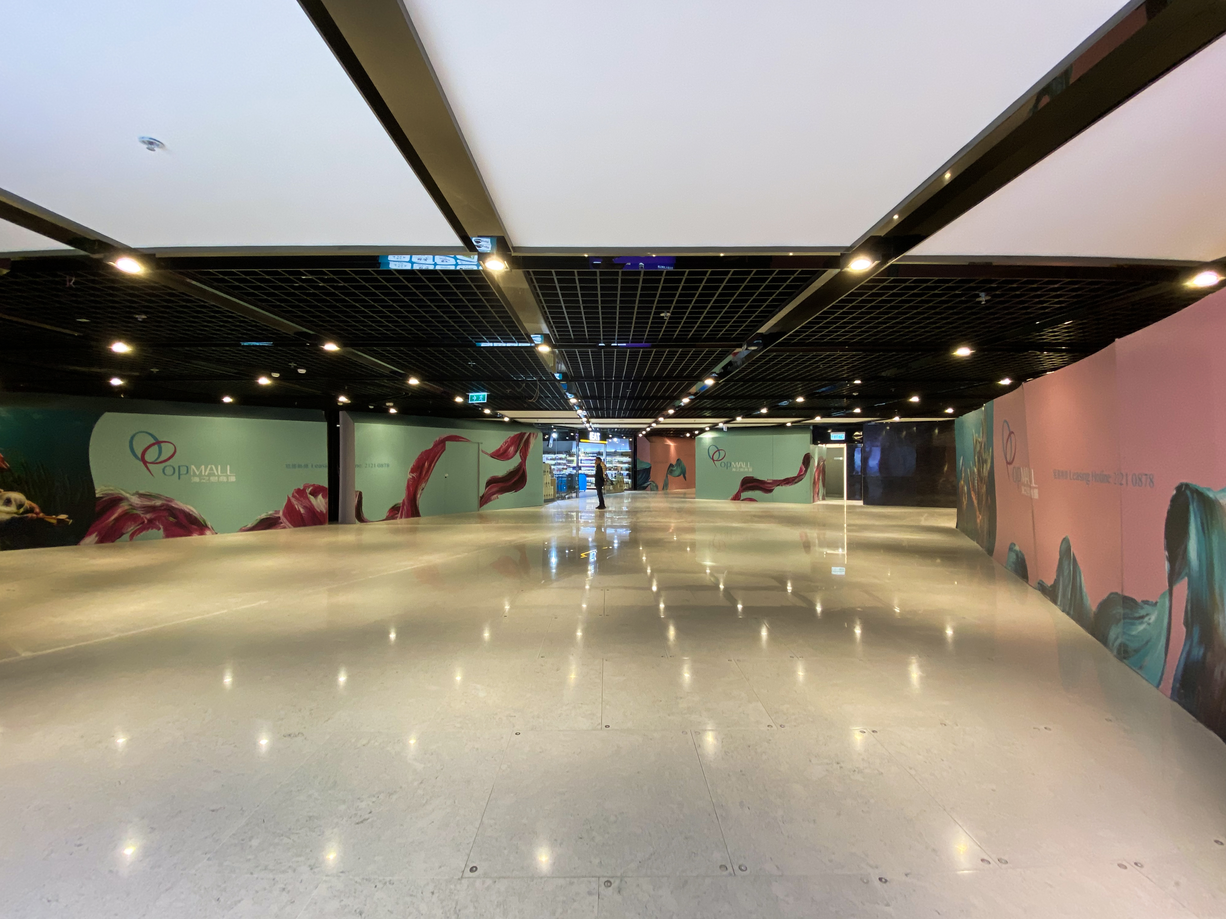 OP Mall GF